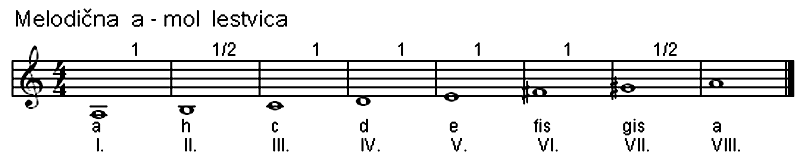 Mol lestvica je smotana! Zakaj se je moramo učiti že v 6. razredu